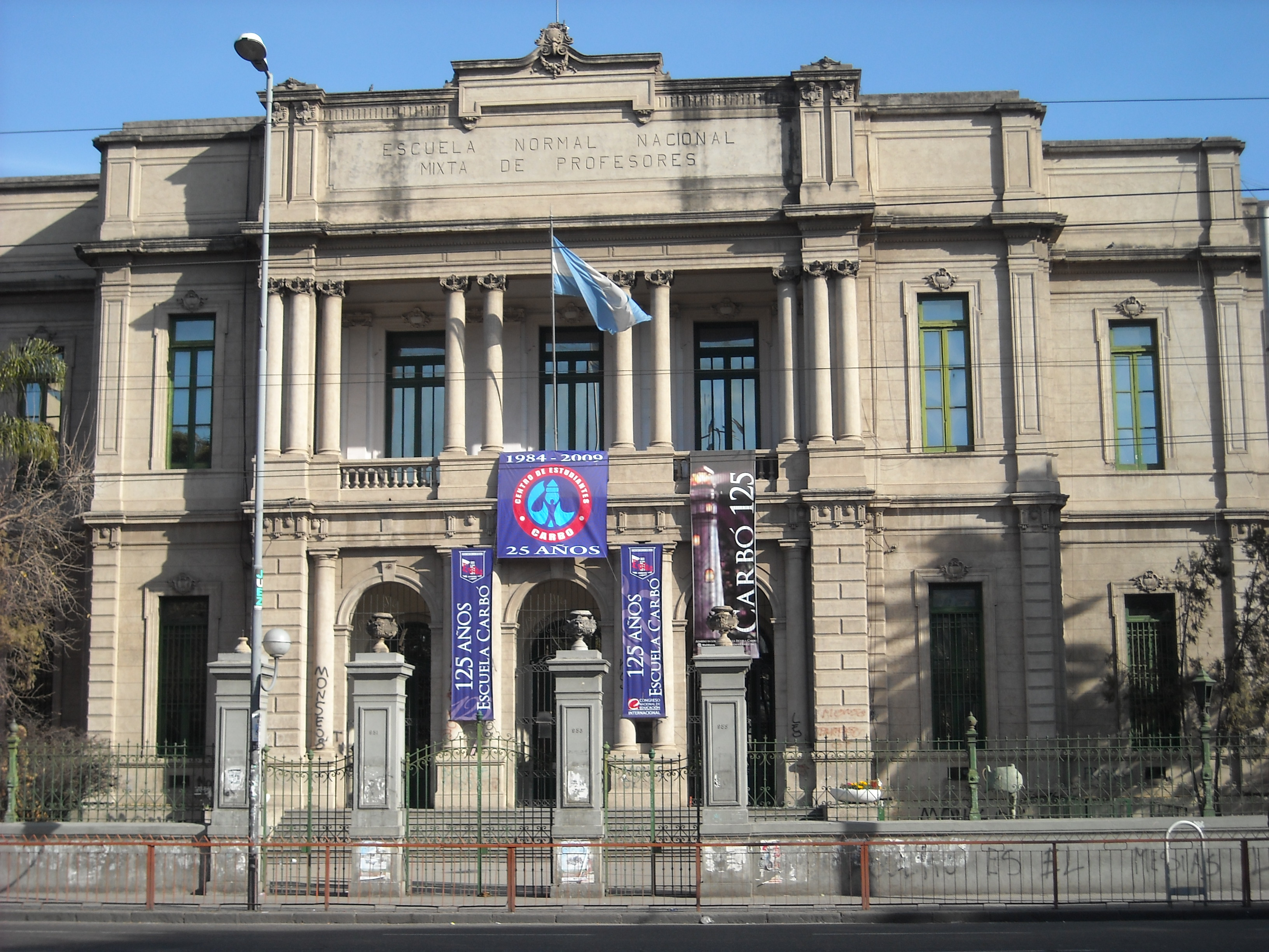 Escuela Normal Nacional Mixta de Profesores Alejandro Carbó, Barrio Alberdi, Córdoba, Argentina